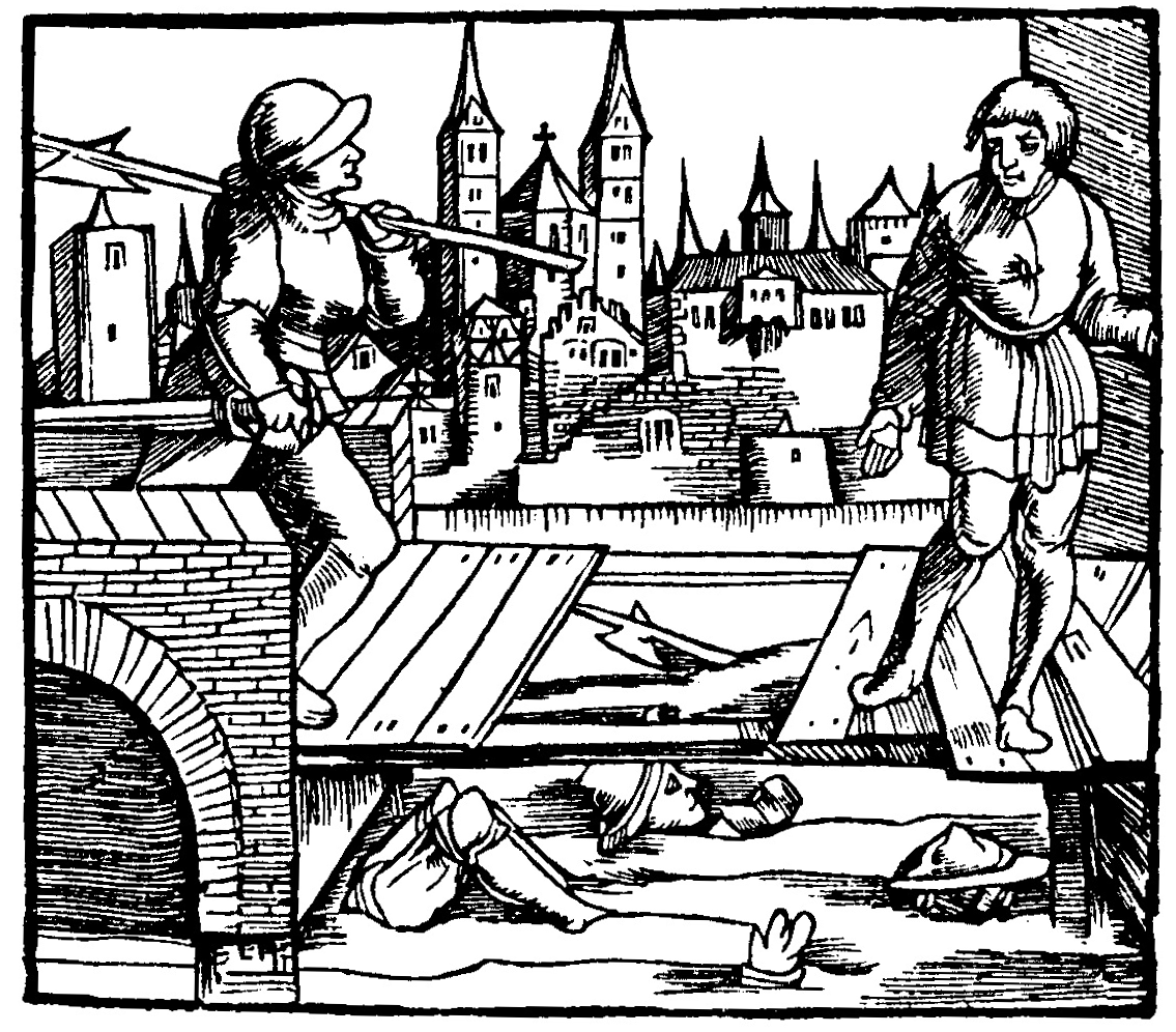 Illustration aus: Ein kurtzweilig lesen von Dyl Vlenspiegel gebore vß dem land zu Brunßwick. Zur 32. Historie, die sagt, wie Eulenspiegel die Stadtwächter in Nürnberg munter machte, die ihm über einen Steg nachfolgten und ins Wasser fielen.